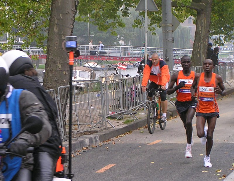 Marathon van Amsterdam, 15 oktober 2006. De koplopers zijn net voorbij het 35km-punt. Links de uiteindelijke winnaar, de Keniaan Solomon Bushendich, rechts zijn landgenoot Barnard Barmasai.